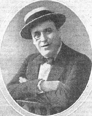 Fotografía del escritor español Antonio de Hoyos y Vinent publicada en 1914 con motivo de la aparición de su libro Oro, seda, sangre y sol y la traducción al francés de El pecado y la noche